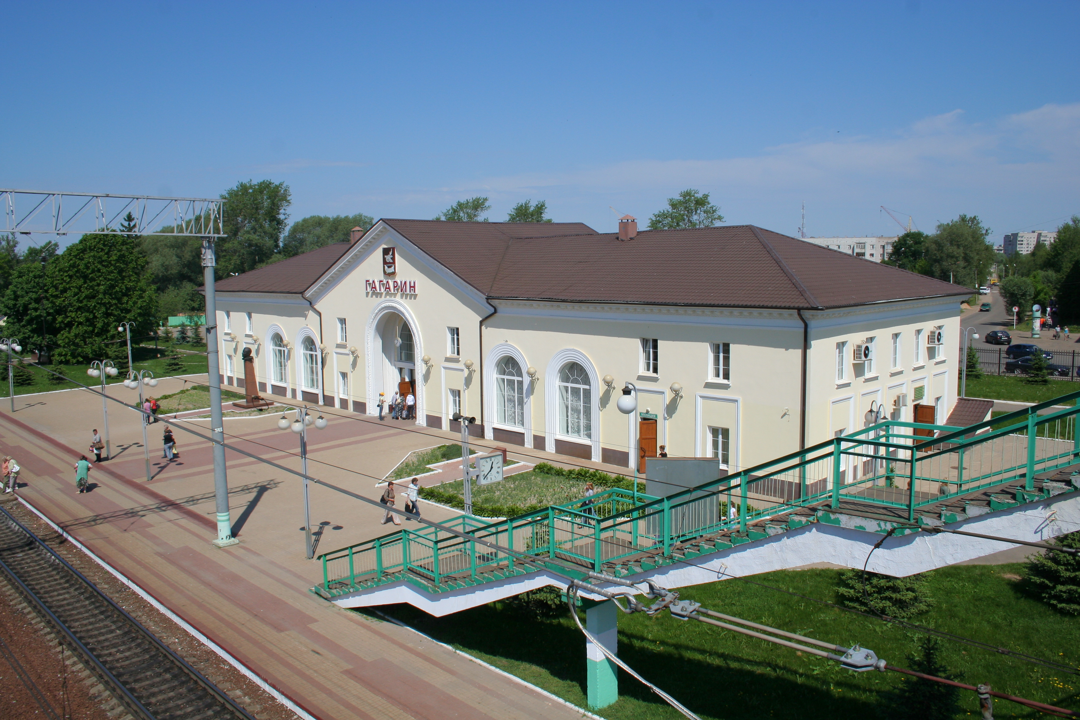 Eisenbahn-Station Gagarin, Oblast Smolensk, Russland.